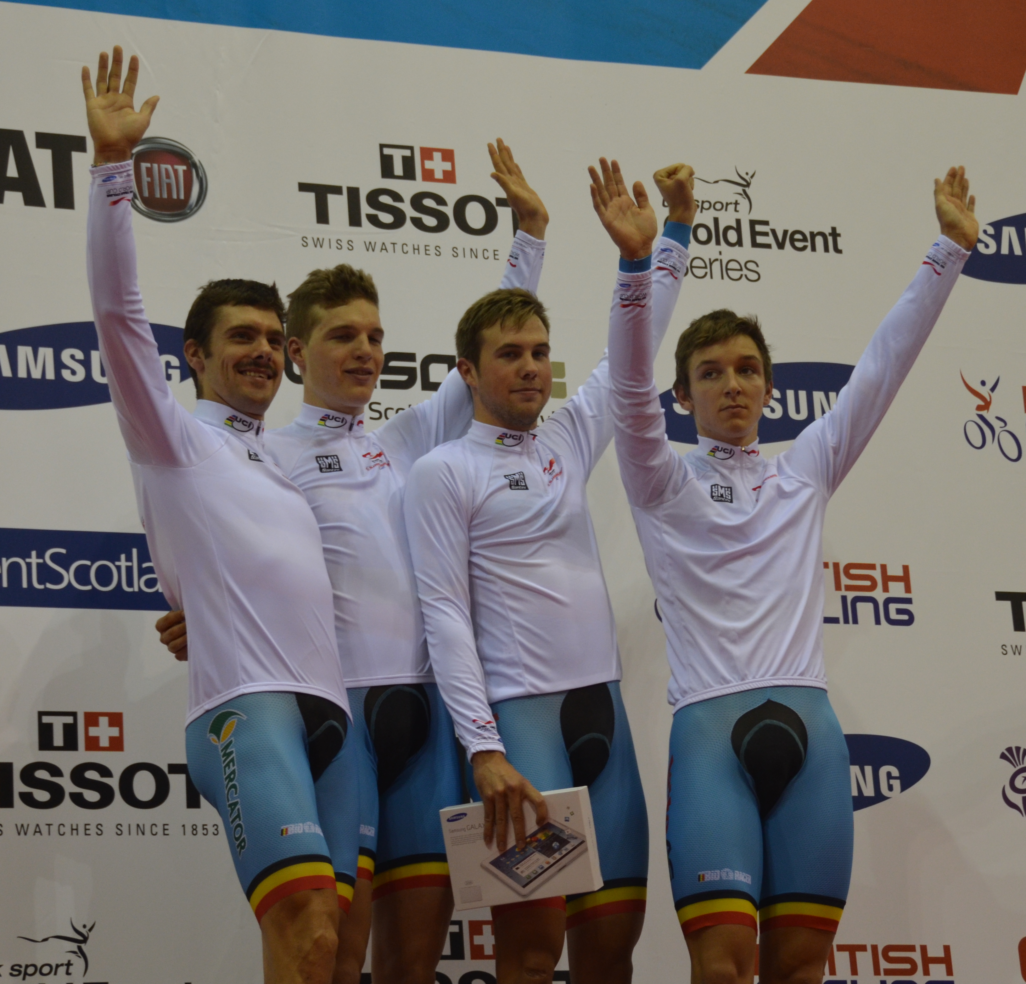 Bahnrad-Weltcup 2012: Belgischer Vierer, v.l.n.r.: Kenny De Ketele, Gijs Van Hoecke, Moreno De Pauw, Jasper De Buyst